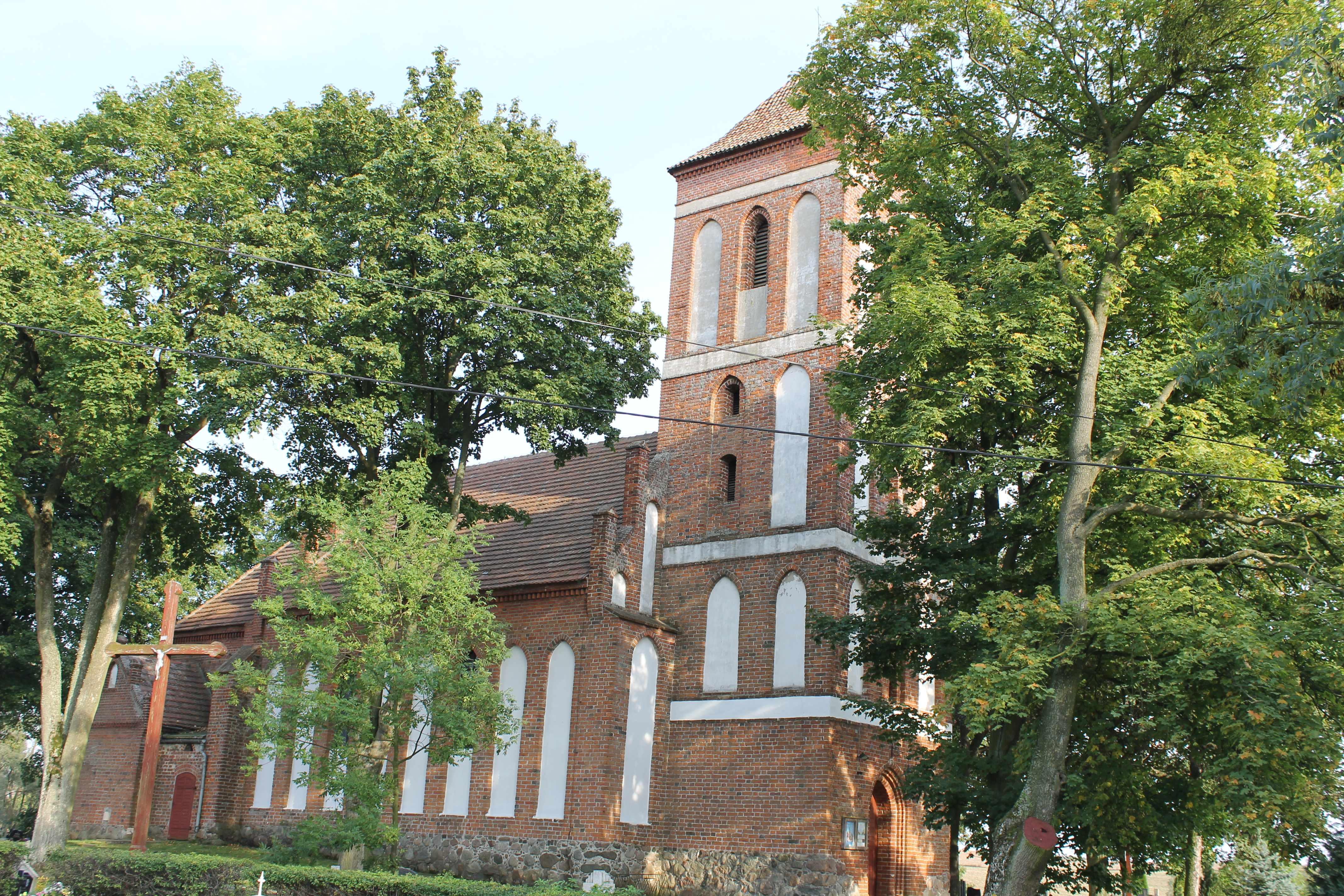 Łopatki 51 - rzymskokatolicki kościół parafialny p.w. św. Marii Magdaleny, 2 ćw. XIV, 1865-1867